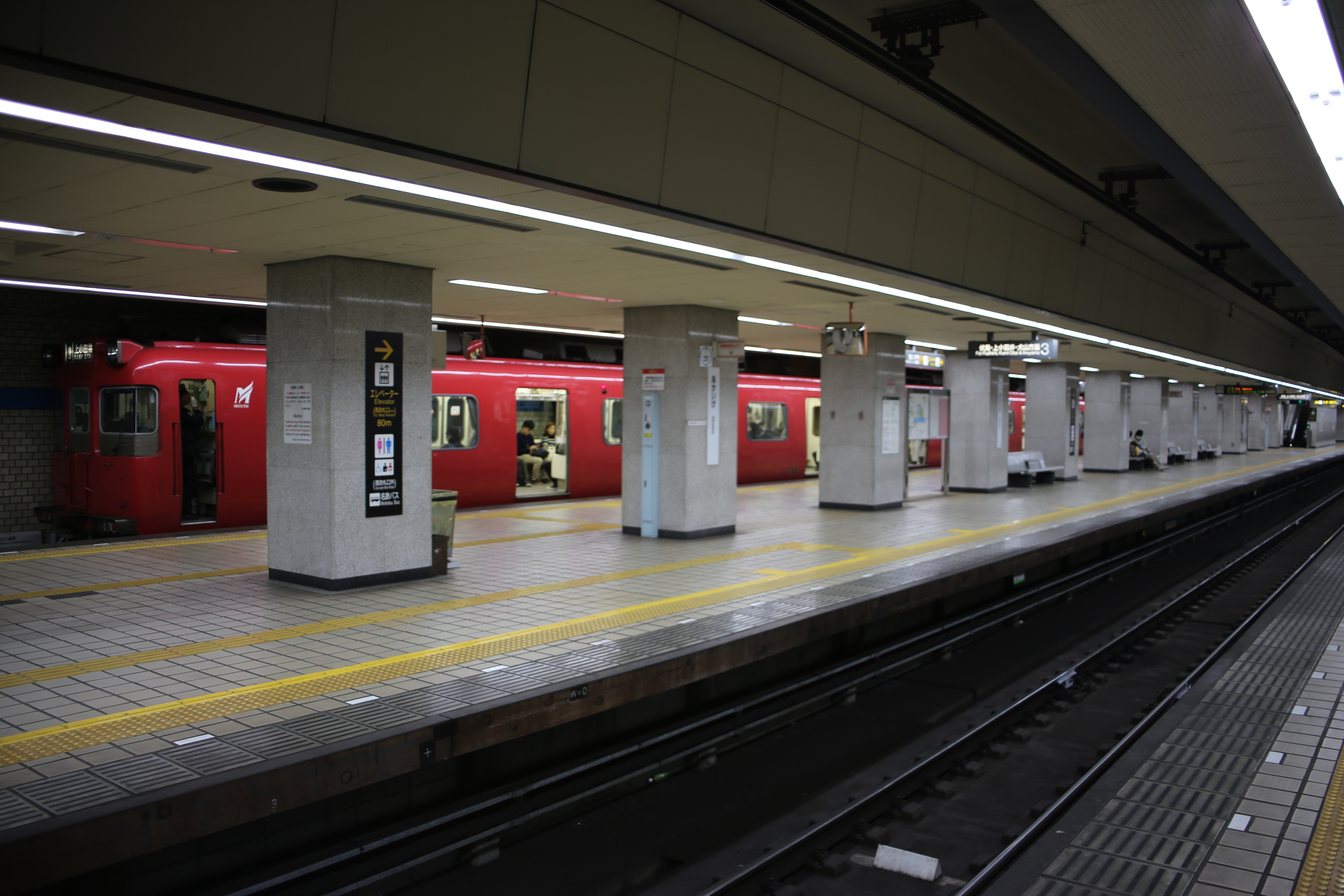 名古屋市営地下鉄鶴舞線赤池駅